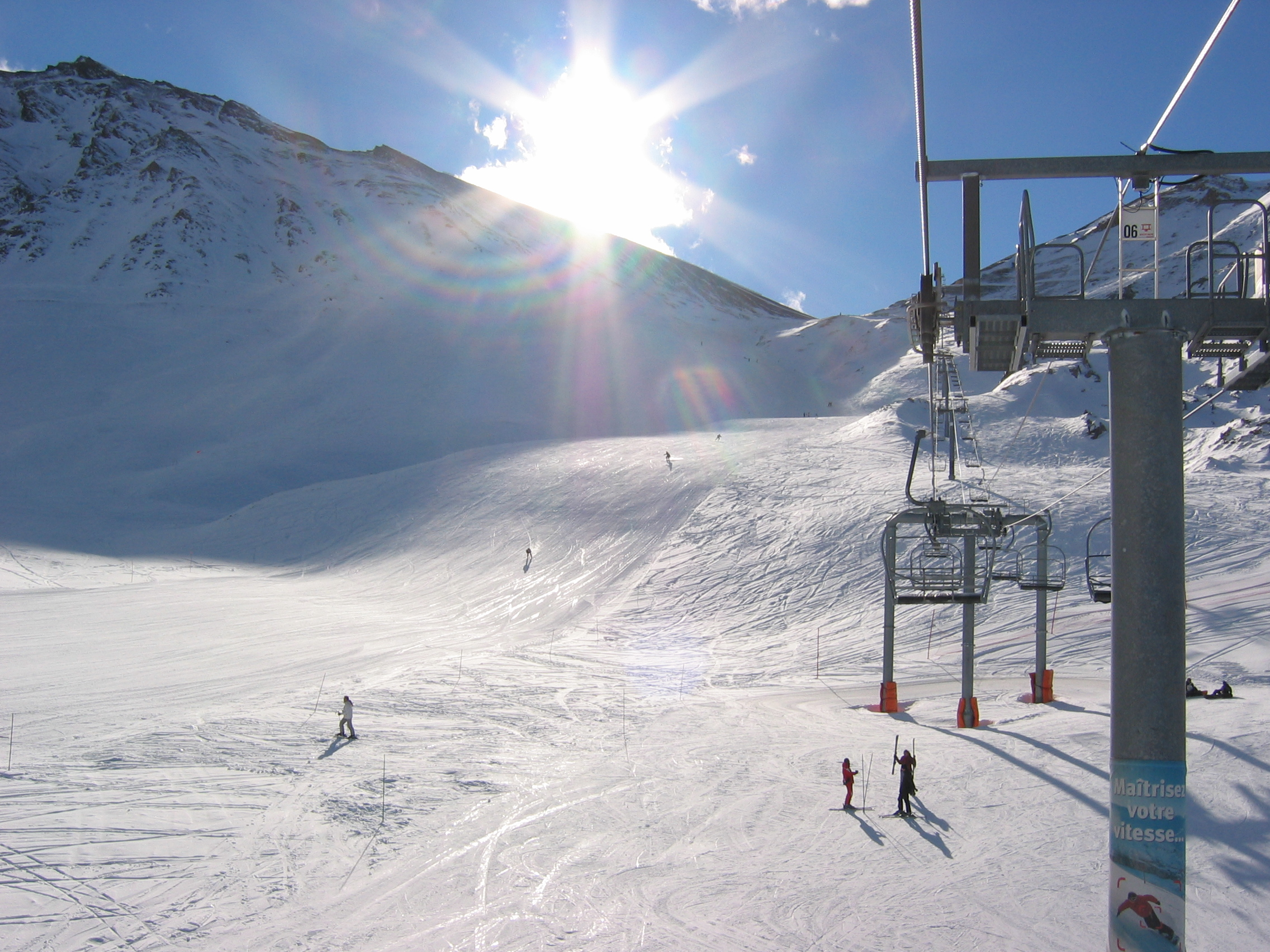 skipiste in Valfrejus, Frankrijk